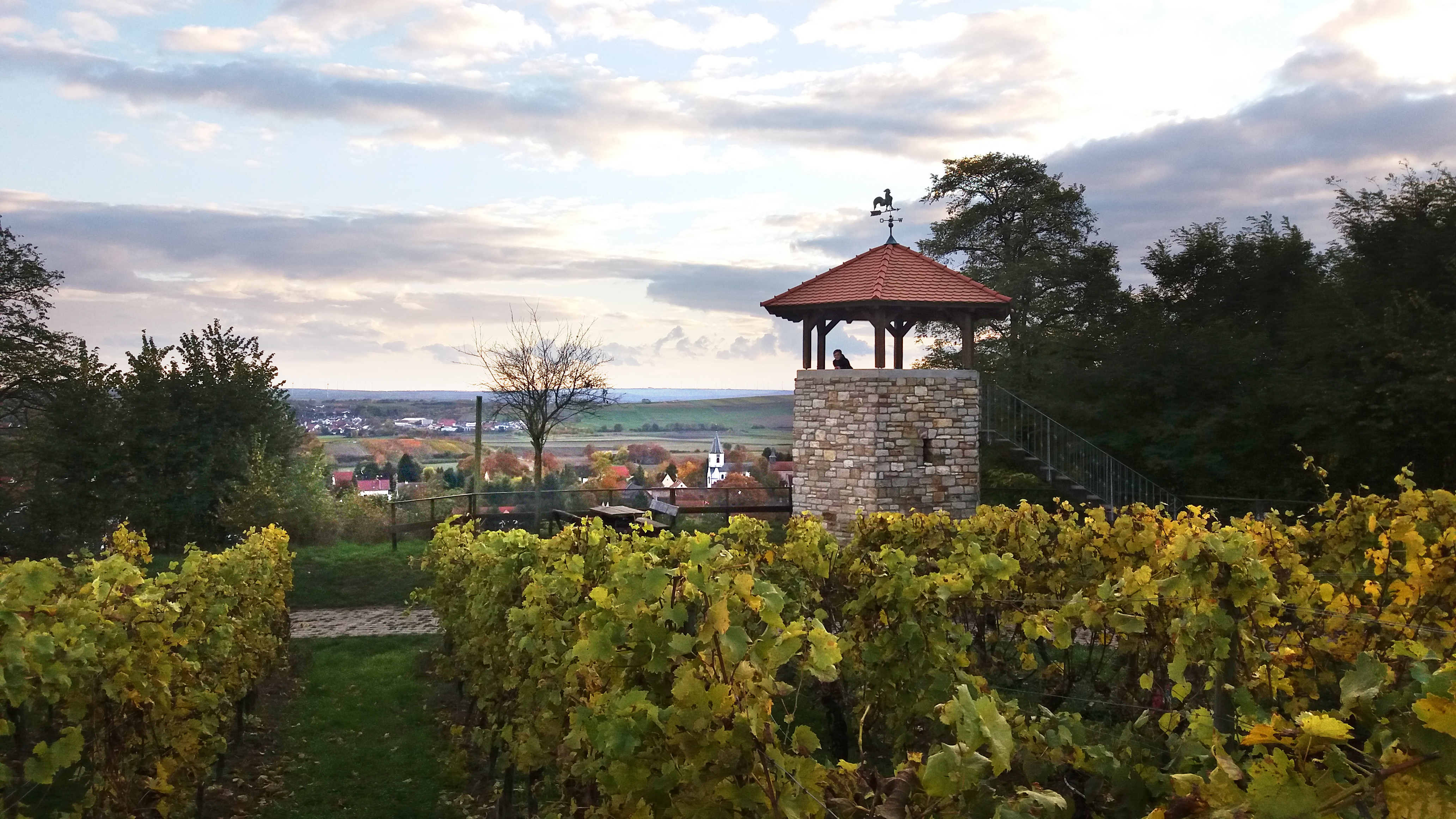 Schlossbergturm bei Harxheim, unten Harxheim mit Pfarrkirche